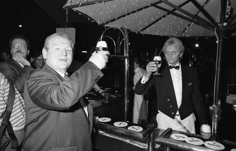 21.09.1988 Journalistenfest im Bundespresseamt